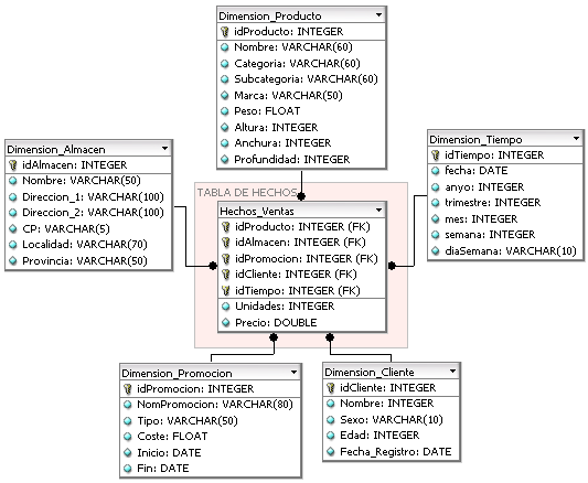 Diseño en estrella de un cubo OLAP